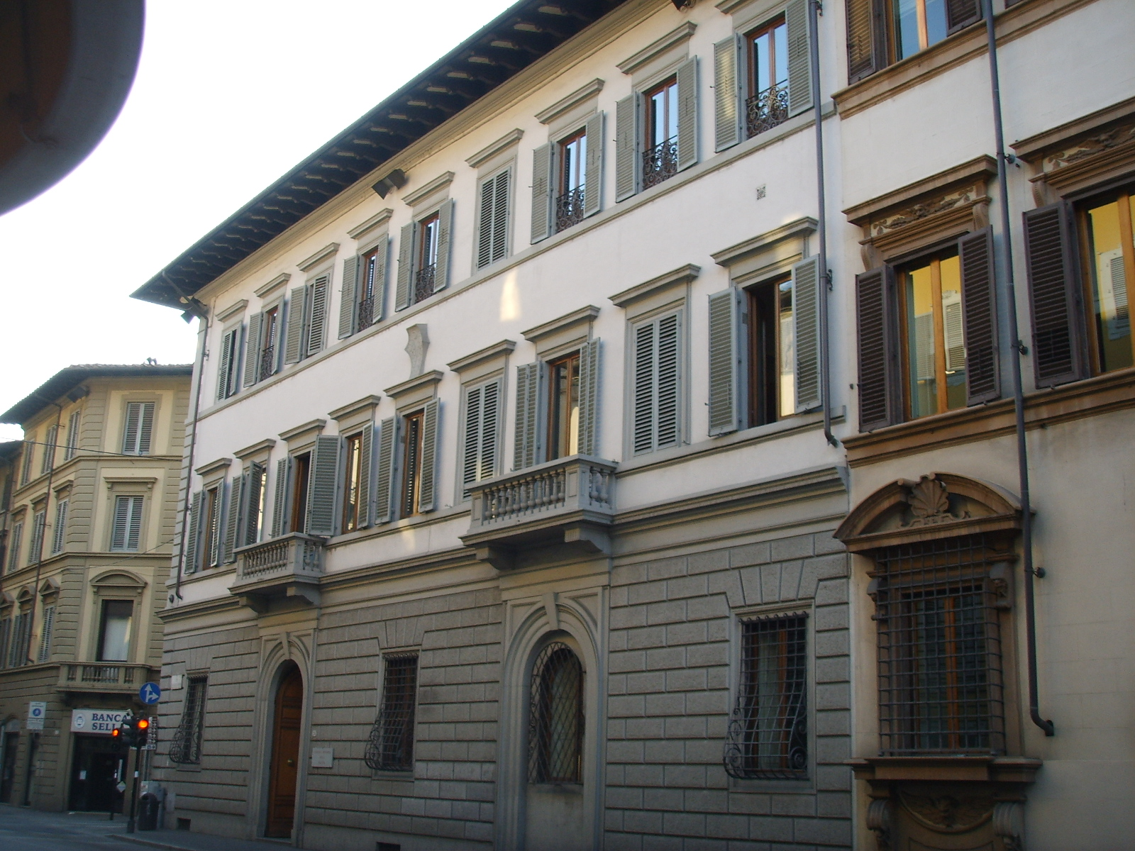 Palazzo_Vettori in Florence